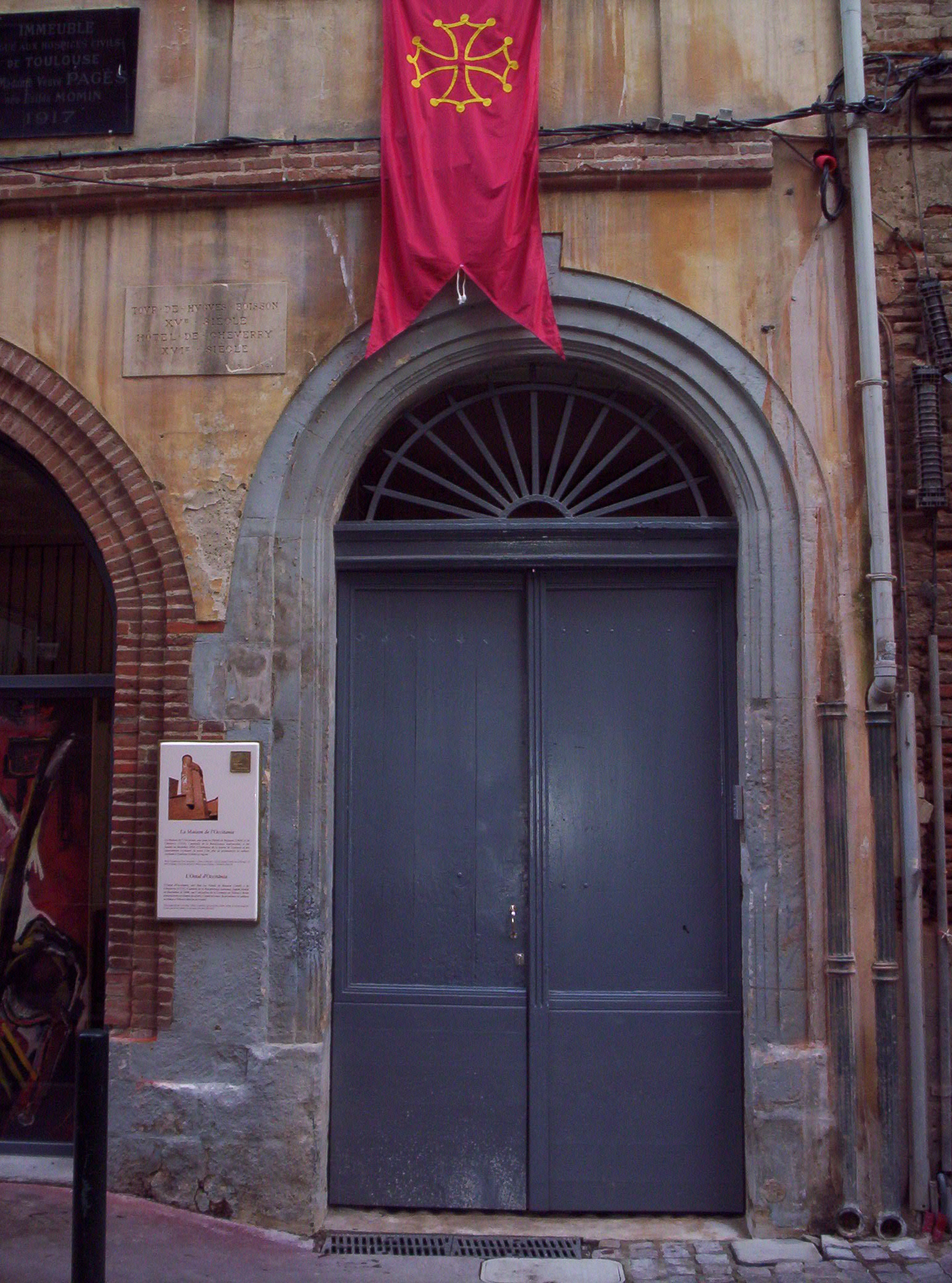 Fach per ieu Cedric31